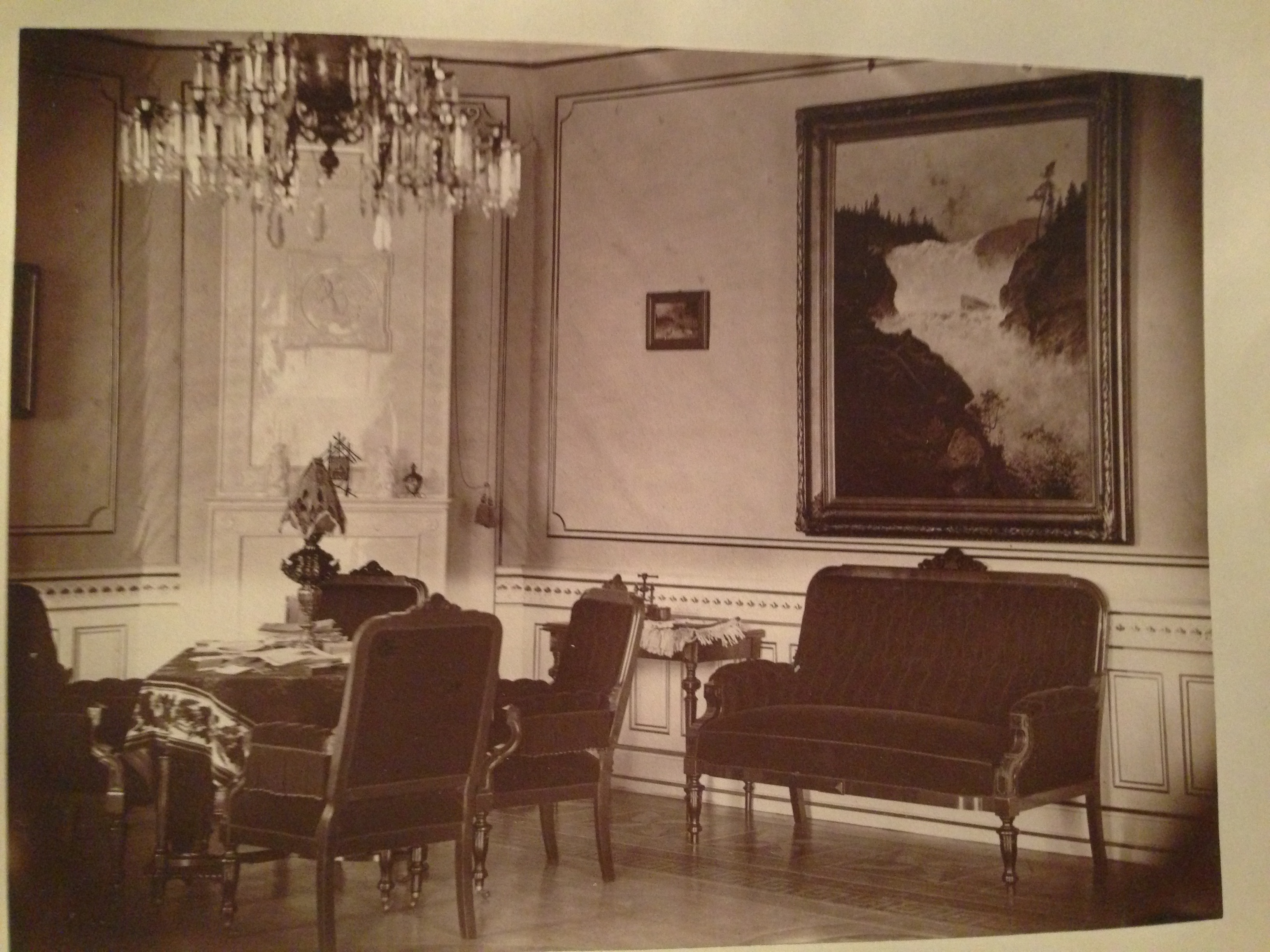 Interiør fra 1885. Melgården på Deset i Åmot. Fotograf: T.N. Mykleby